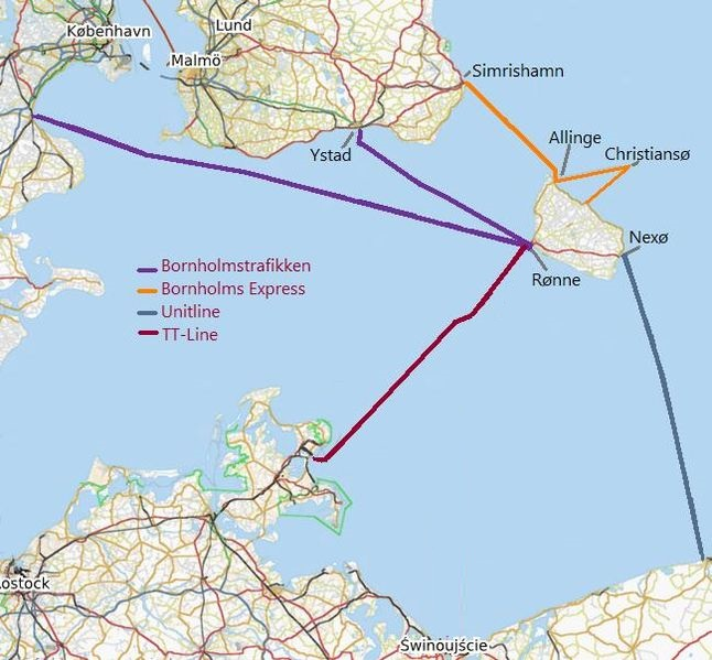 Færgeforbindelser fra og til Bornholm